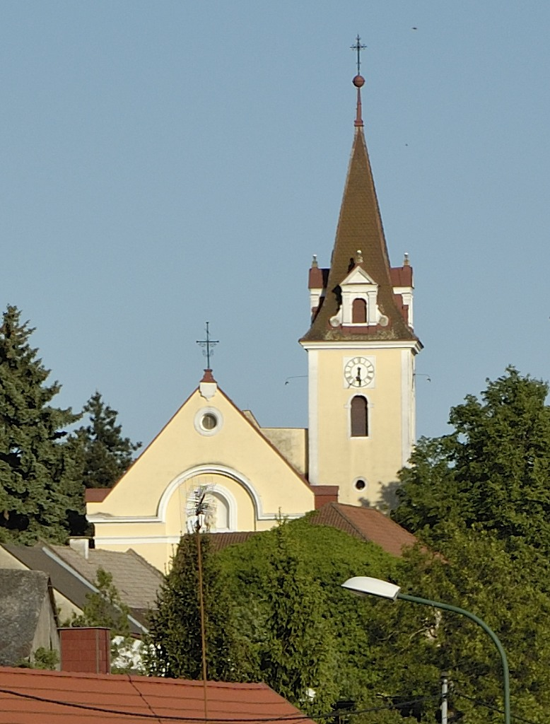 Kath. Pfarrkirche hl. Veit und ehem. Friedhof